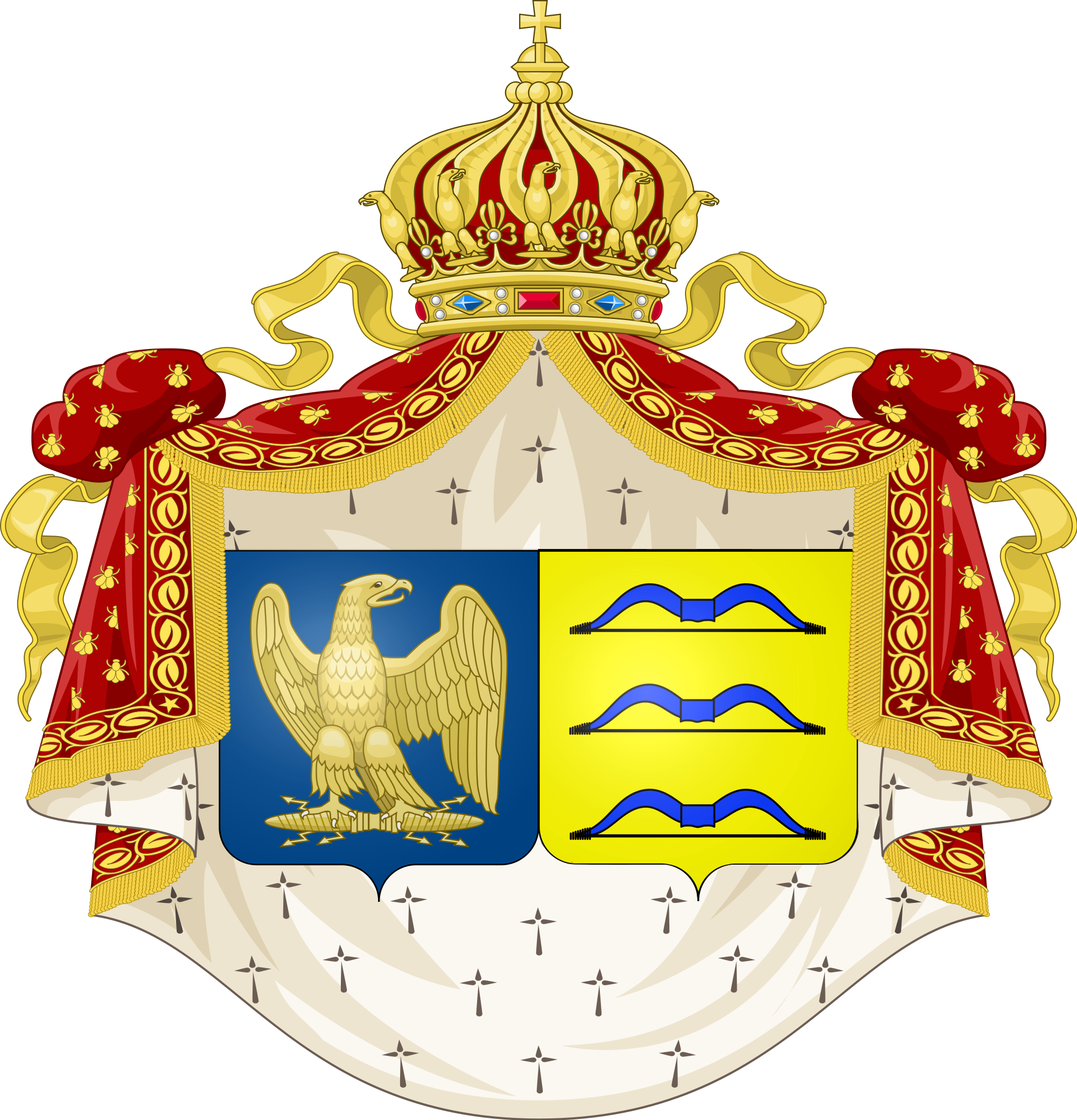 Armoiries d'Olympia von Arco-Zinneberg